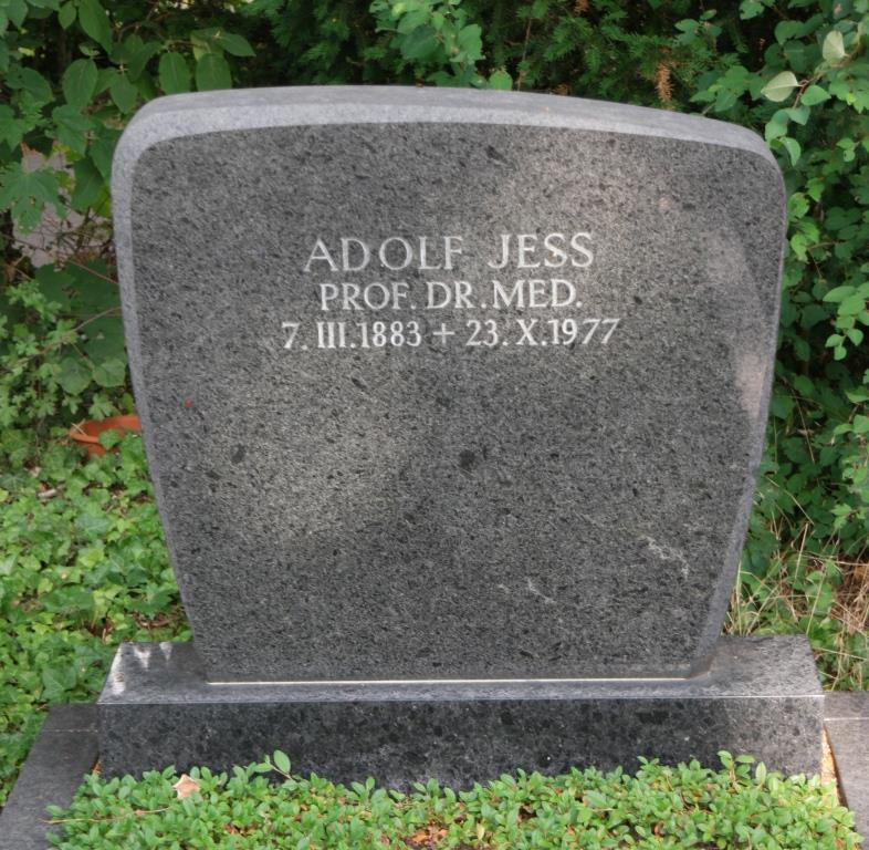 Grab des Augenarztes Adolf Jess, 1883-1977, auf dem Hauptfriedhof in Mainz